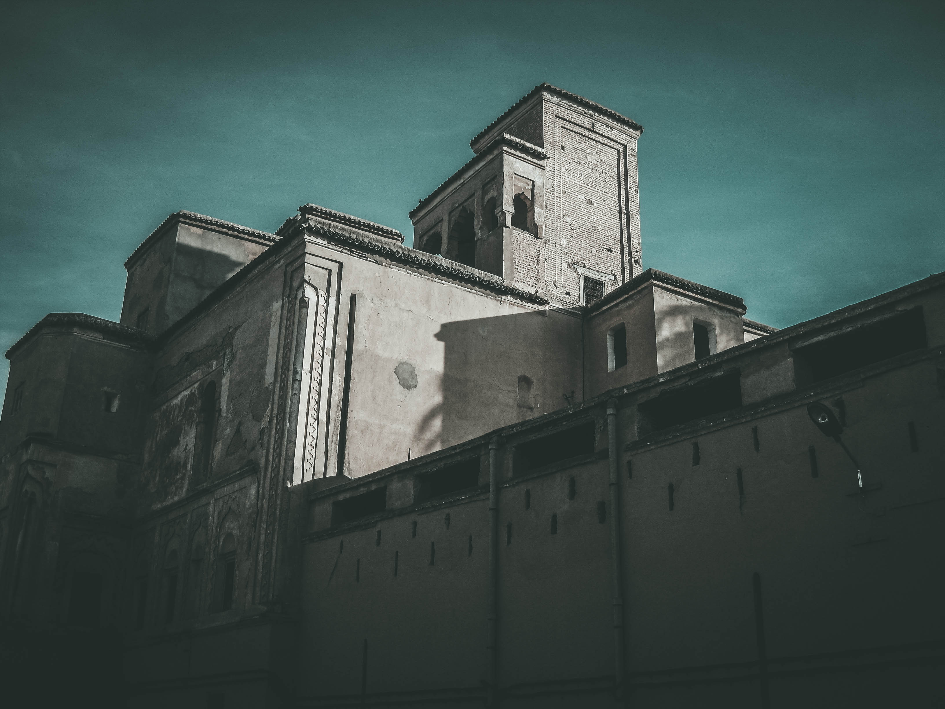 قصر قديم ، يعود بناءه إلى نهاية القرن التاسع عشر، بنيت في عهد السعديين وهي ذات طابع عسكري وسميت بهذا الاسم لوجود مكان لتخزين السلاح بها